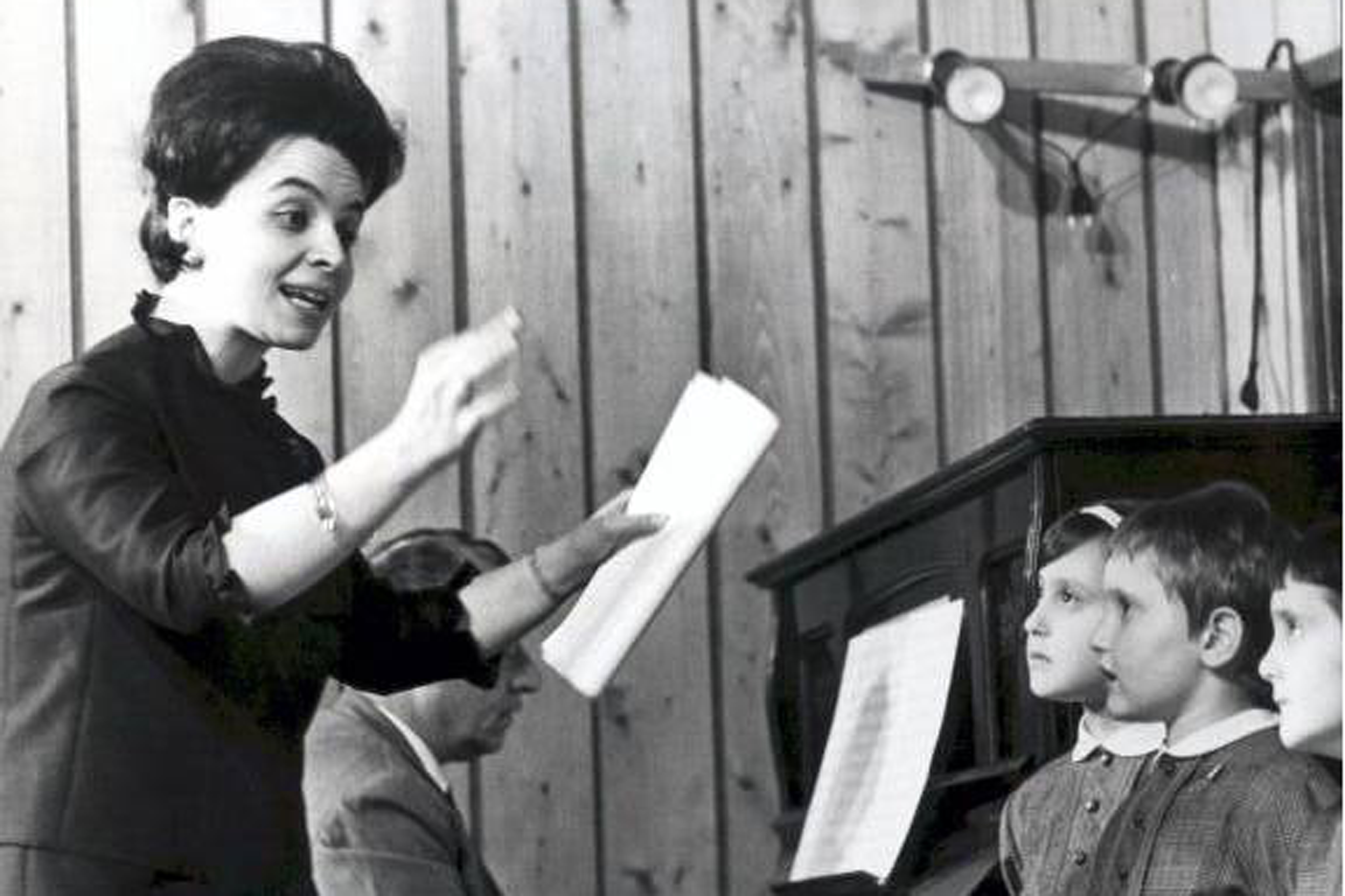 Mariele ventre insegna ai bambini, 1966